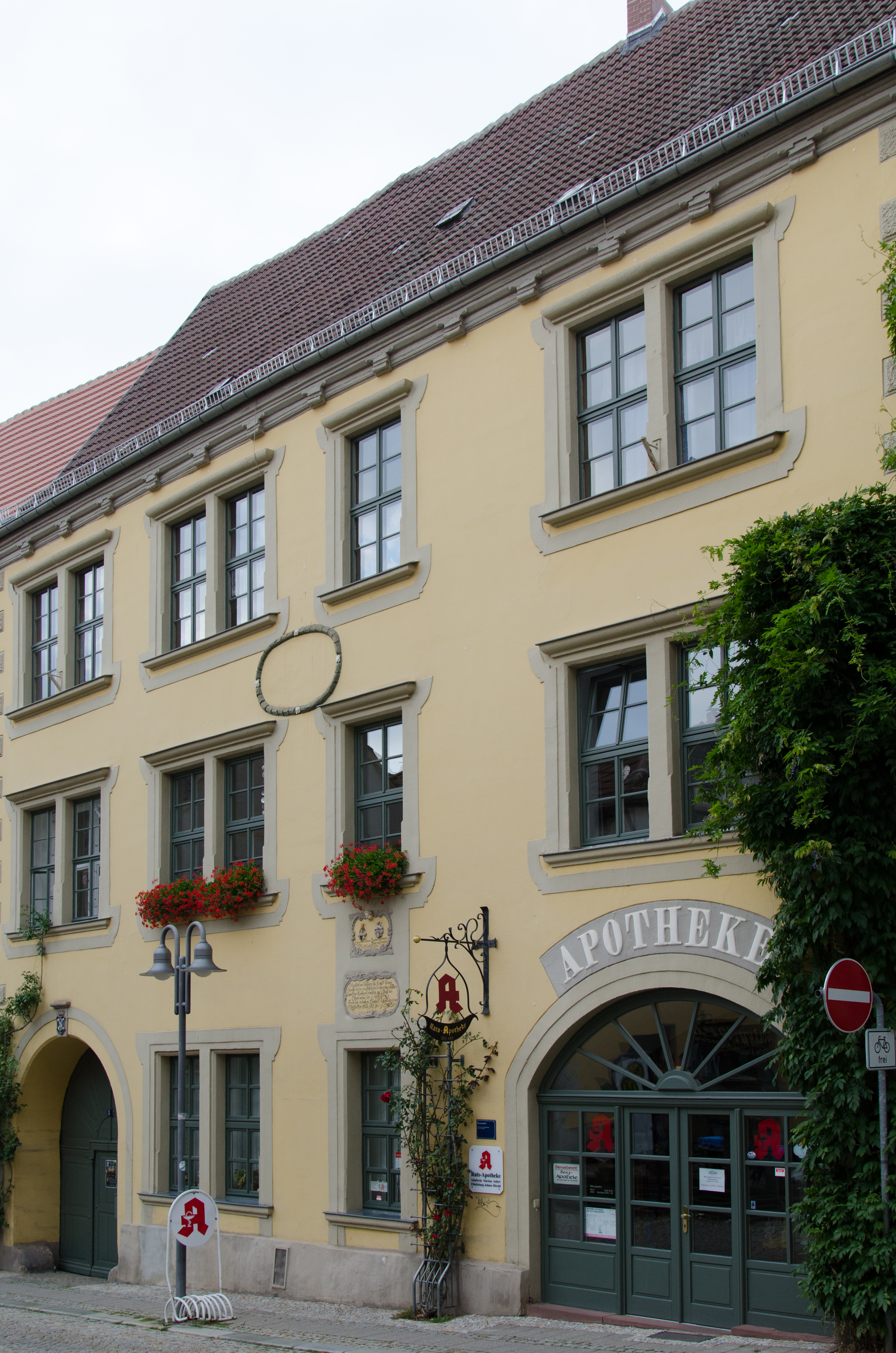 Sangerhausen, Kornmarkt 3